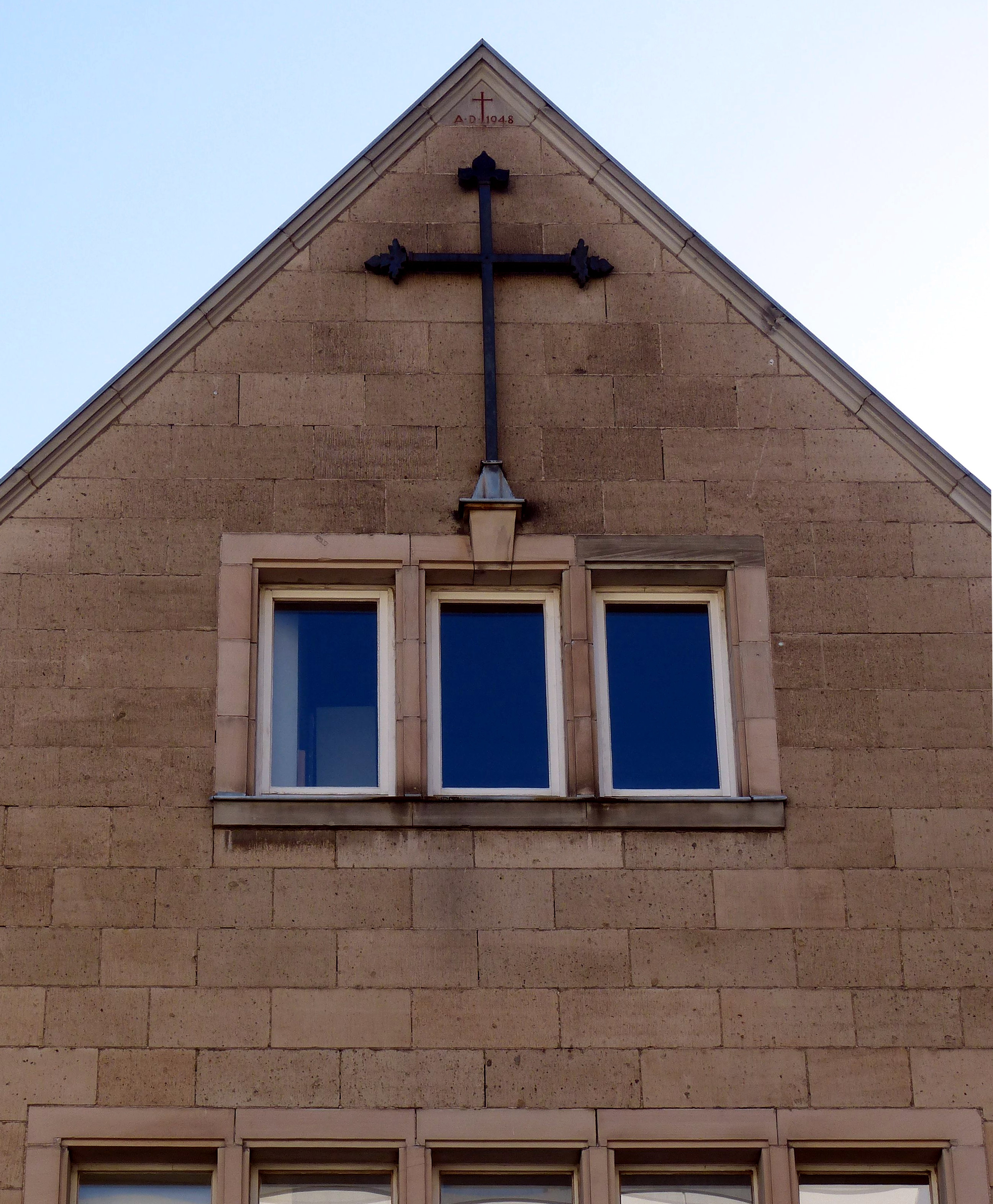 Der Giebel des Pfarrhaus St. Stephan in Köln-Lindenthal mit dem Chorkreuz der im II. Weltkrieg zerstörten Kirche St. Stephan